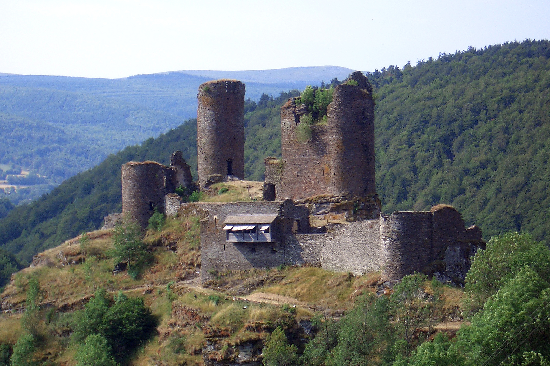 Château de Saint-Julien du Tournel en Lozère (France) pris d'une certaine distance après l'avoir visité